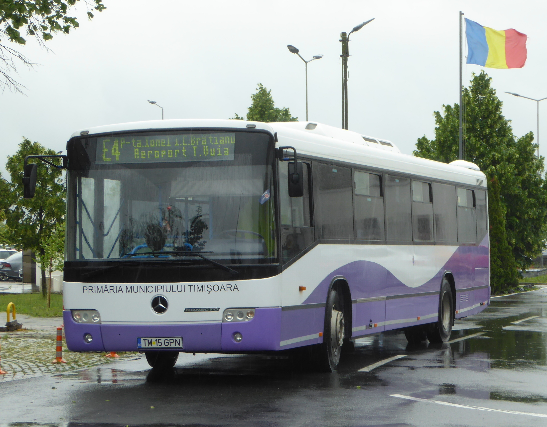 Temeswar, Bus der Flughafenlinie E4.